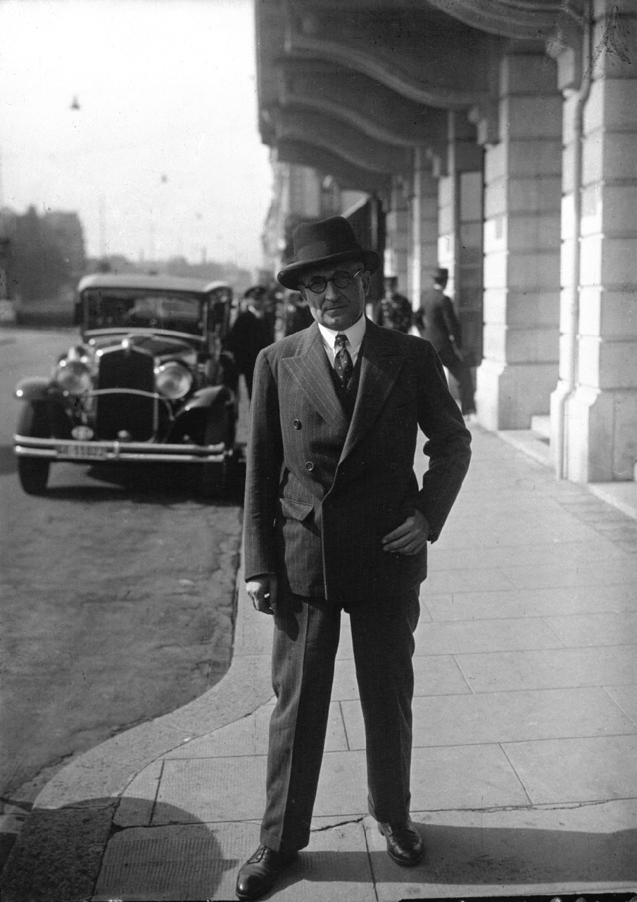 Salvador de Madariaga, président de la délégation espagnole [Genève, S.D.N.] : [photographie de presse] / Agence Meurisse.